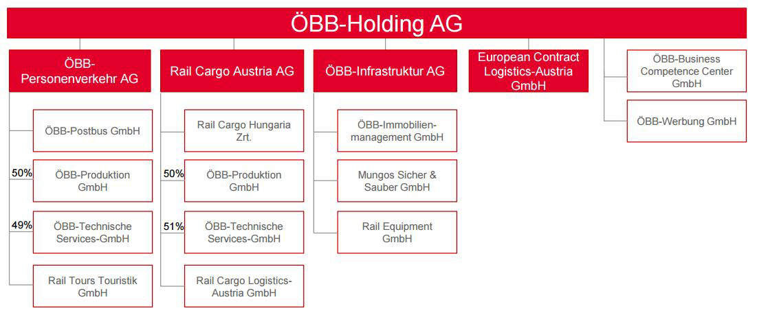 OeBBKonzernorganigrammSept2014